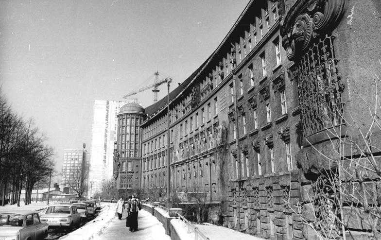 Leipzig, "Deutsche Bücherei" Leipzig: Zur Stadtverordnetenversammlung von Leipzig am 21.3.79-Blick auf die "Deutsche Bücherei" die als Gesamtarchiv des deutschsprachigen Schrifttums grundlegende Aufgaben einer Nationalbibliothek erfüllt. Harmonisch fügen sich Bauten eines neuen Wohnviertels in das Bild der Straße des 18. Oktobers ein. (beachten Sie dazu unsere Fotos U0321-18 bis 21N) U0321-17N